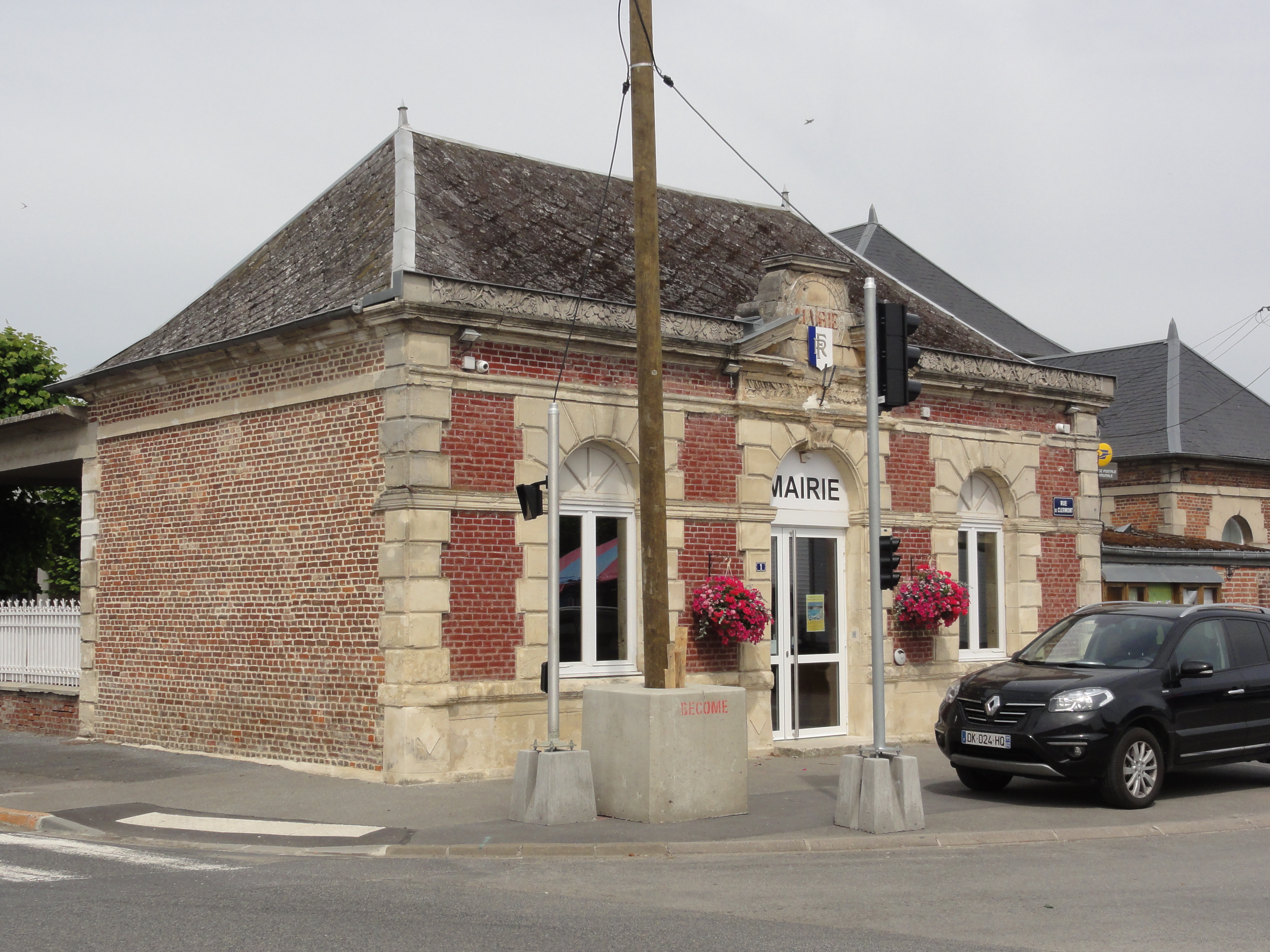 Dizy-le-Gros (Aisne) mairie